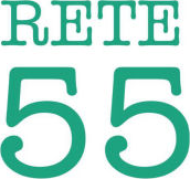 Old logo Rete55